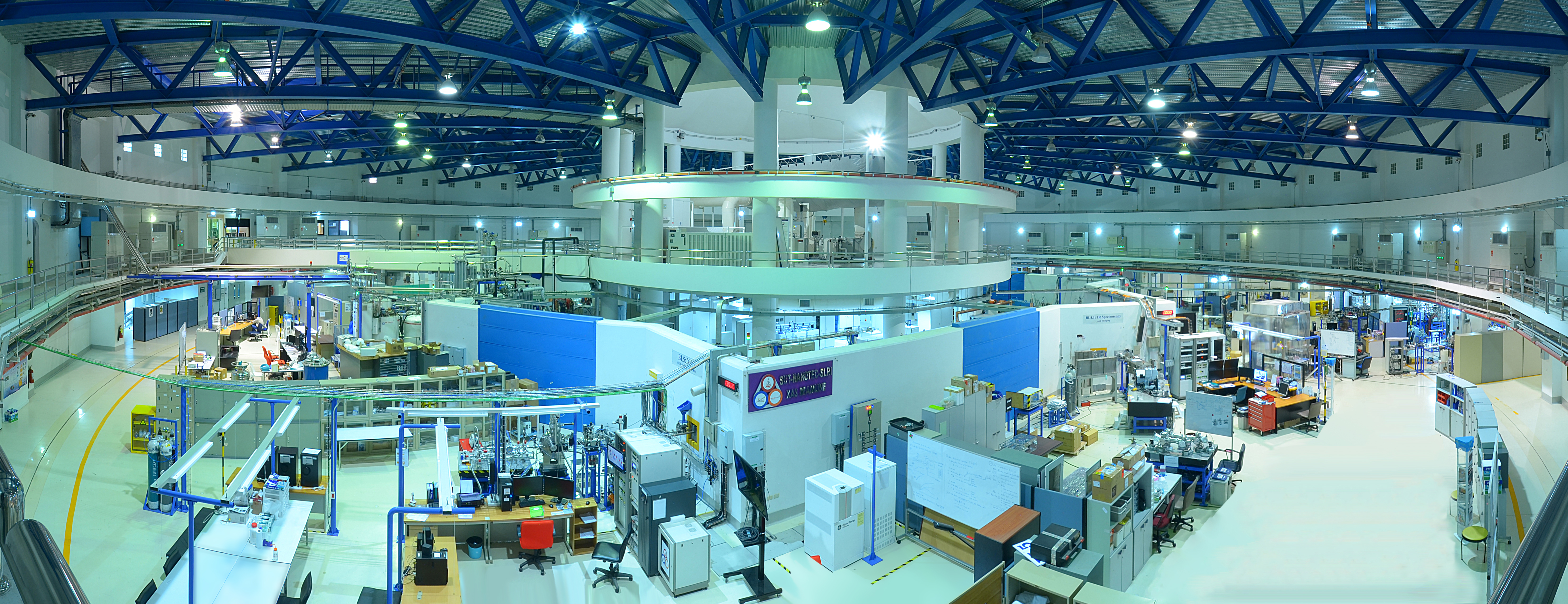 slri lab